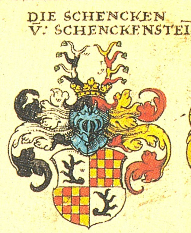 Ritterschaft und Adel in Schwaben Die Schenk von Schenkenstein